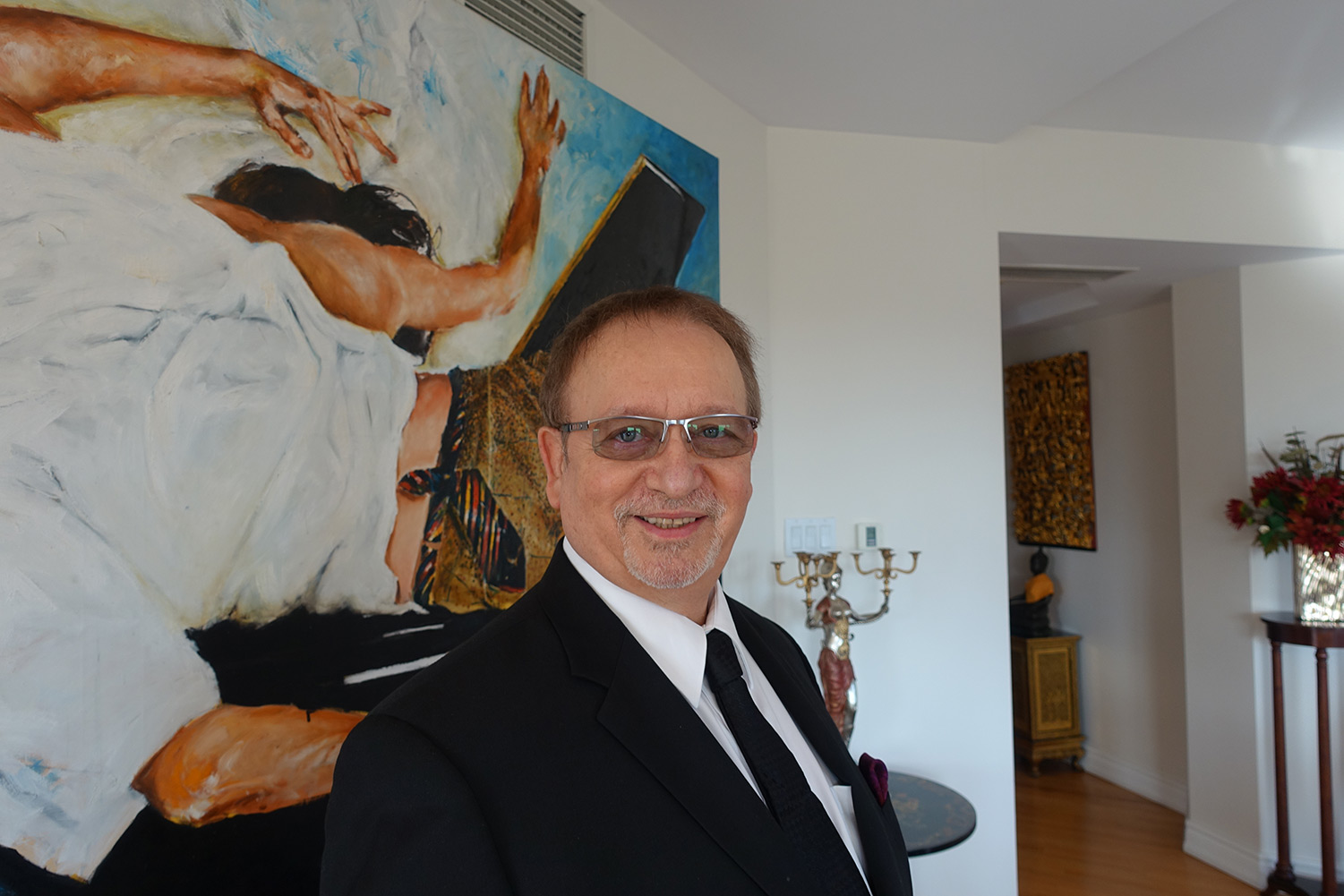 Jean-Claude Sensemat